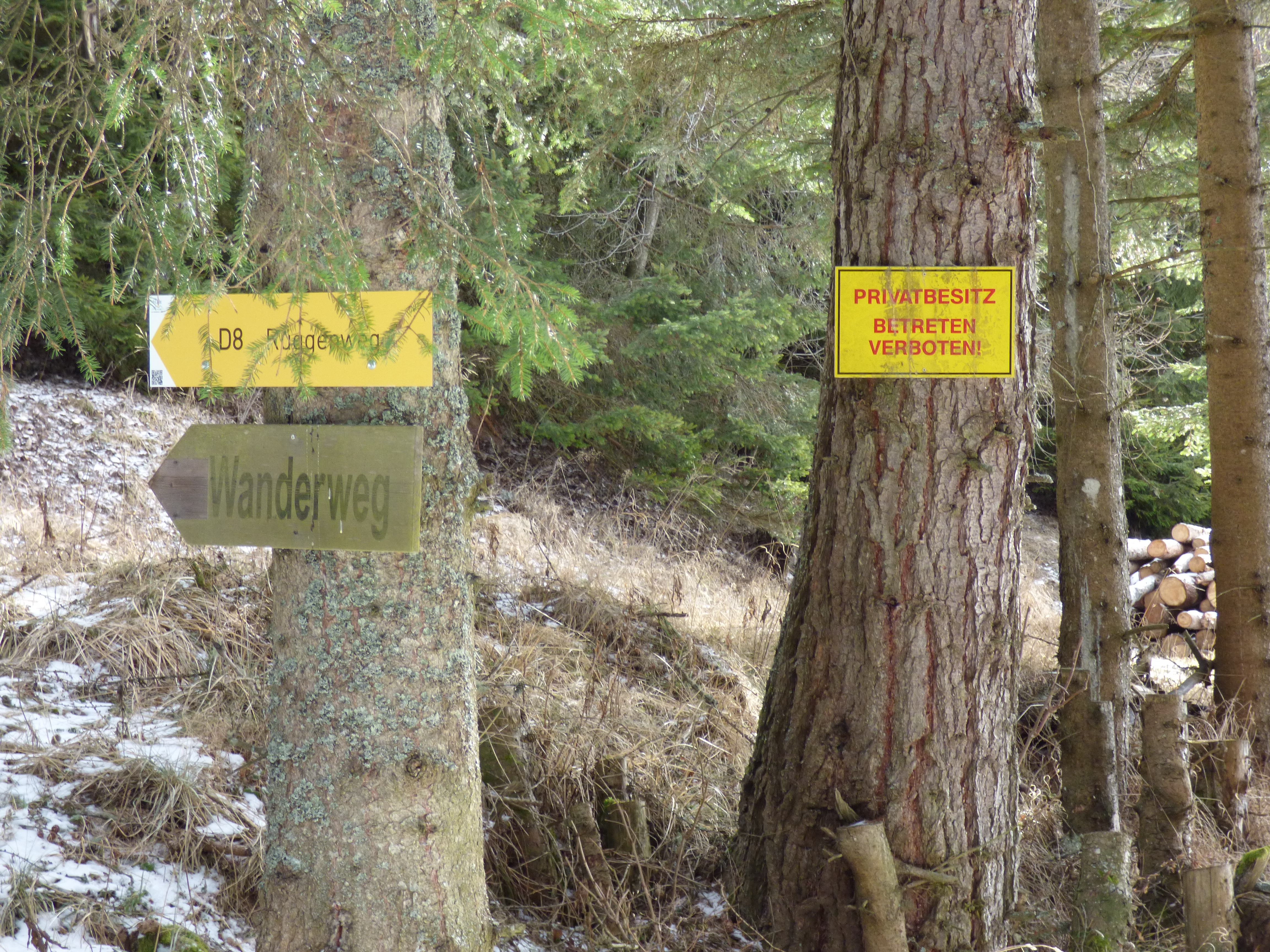 Lobnighof, Gemeinde Eberstein (Kärnten): Begehen des ehemals markierten Wanderwegs vom Besitzer des Hofs untersagt; neue Beschilderung/Umleitung des Wanderwegs.